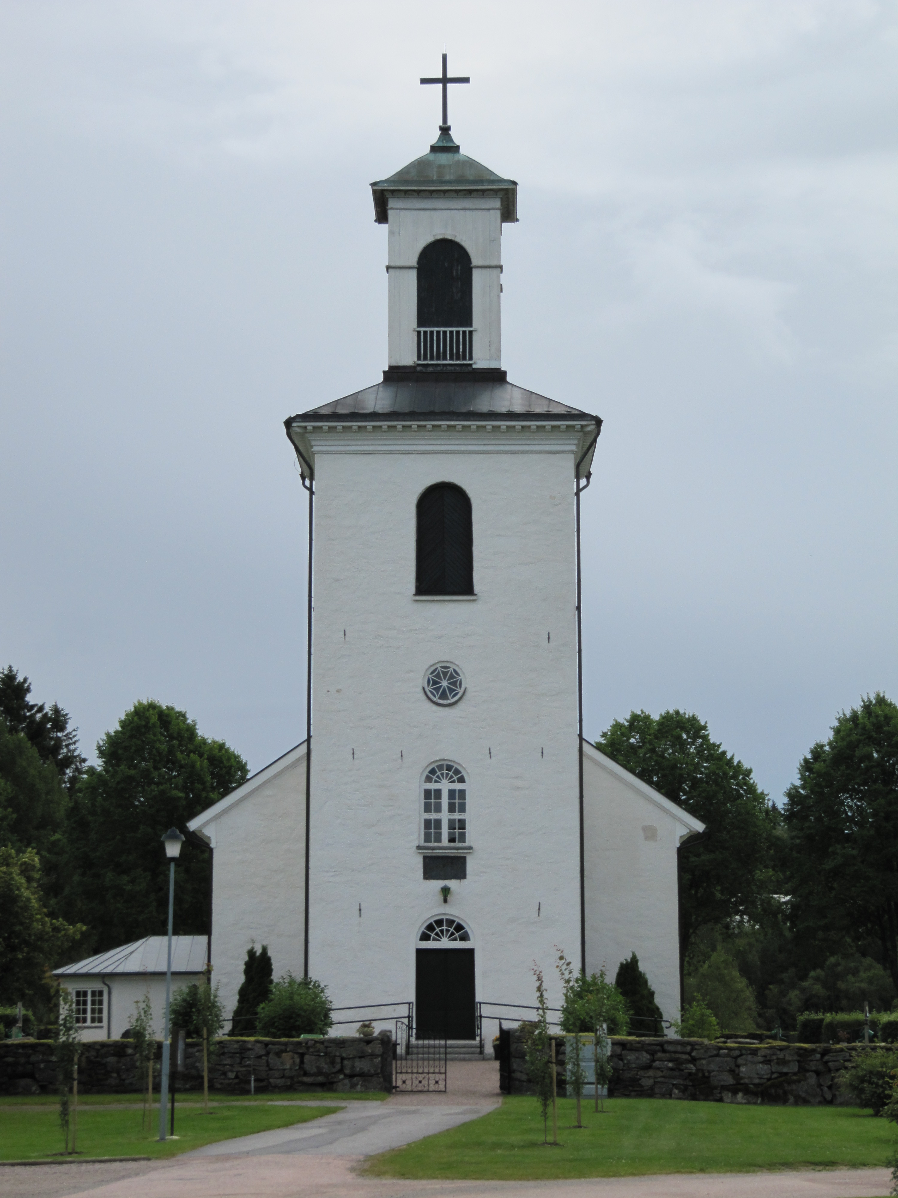 Nittorps kyrka från väster.